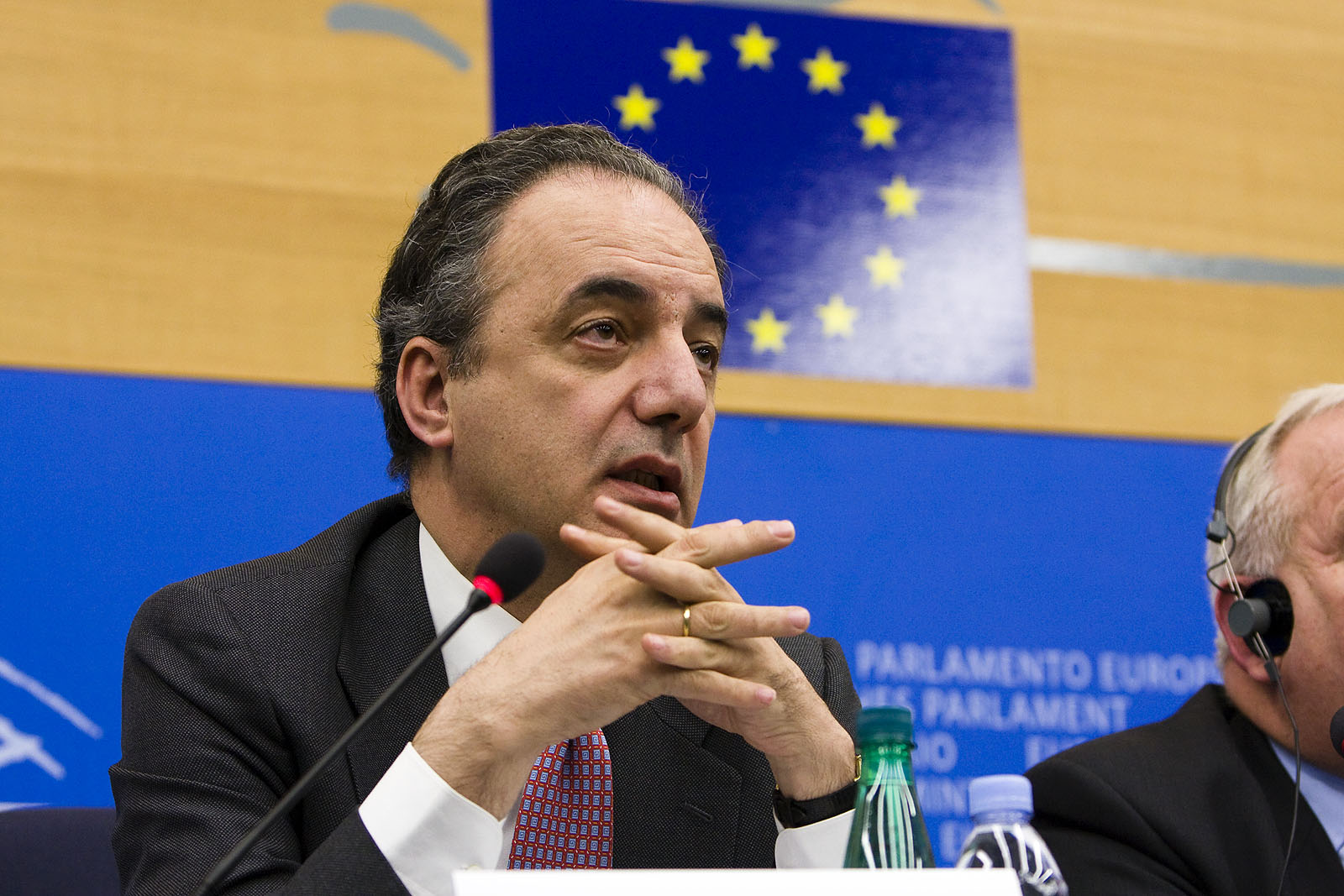 Francisco Millán Mon